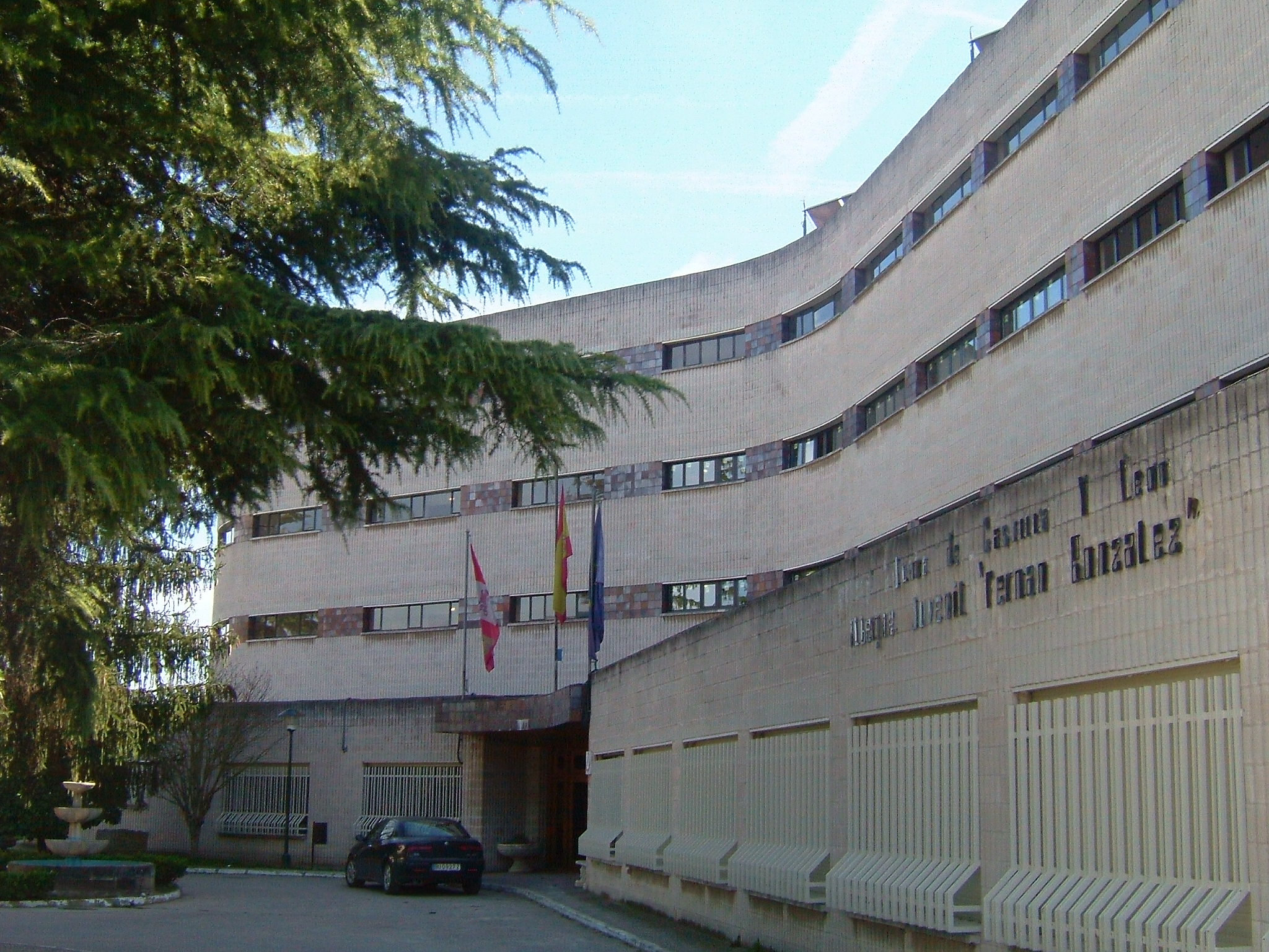 Albergue Juvenil Fernán Gonzalez